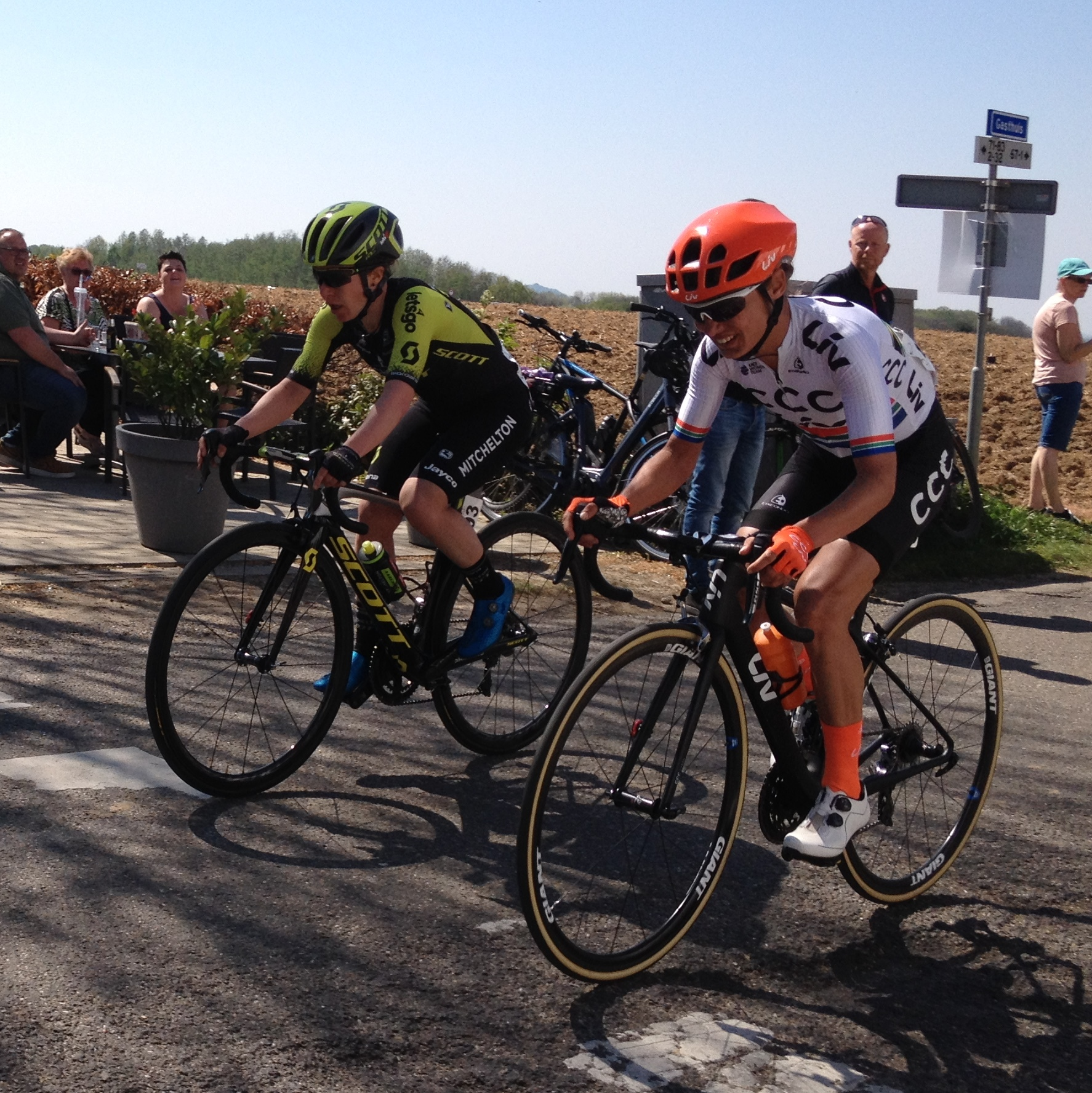 Amstel Gold Race Ladies Edition 2019 op de laatste beklimming van de Bemelerberg